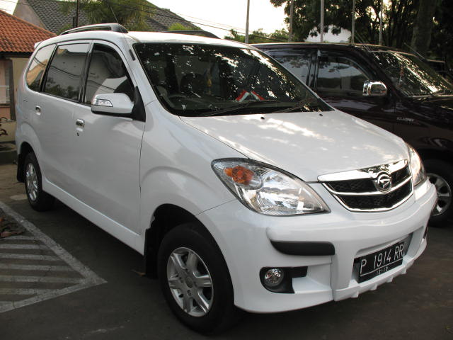 Daihatsu Xenia Li 1.0 image taken in Jember, Indonesia